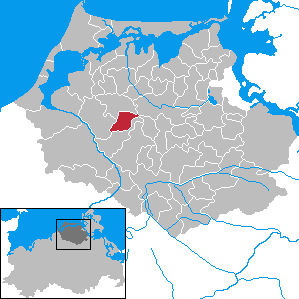 Schlemmin in Mecklenburg-Vorpommern - District Nordvorpommern